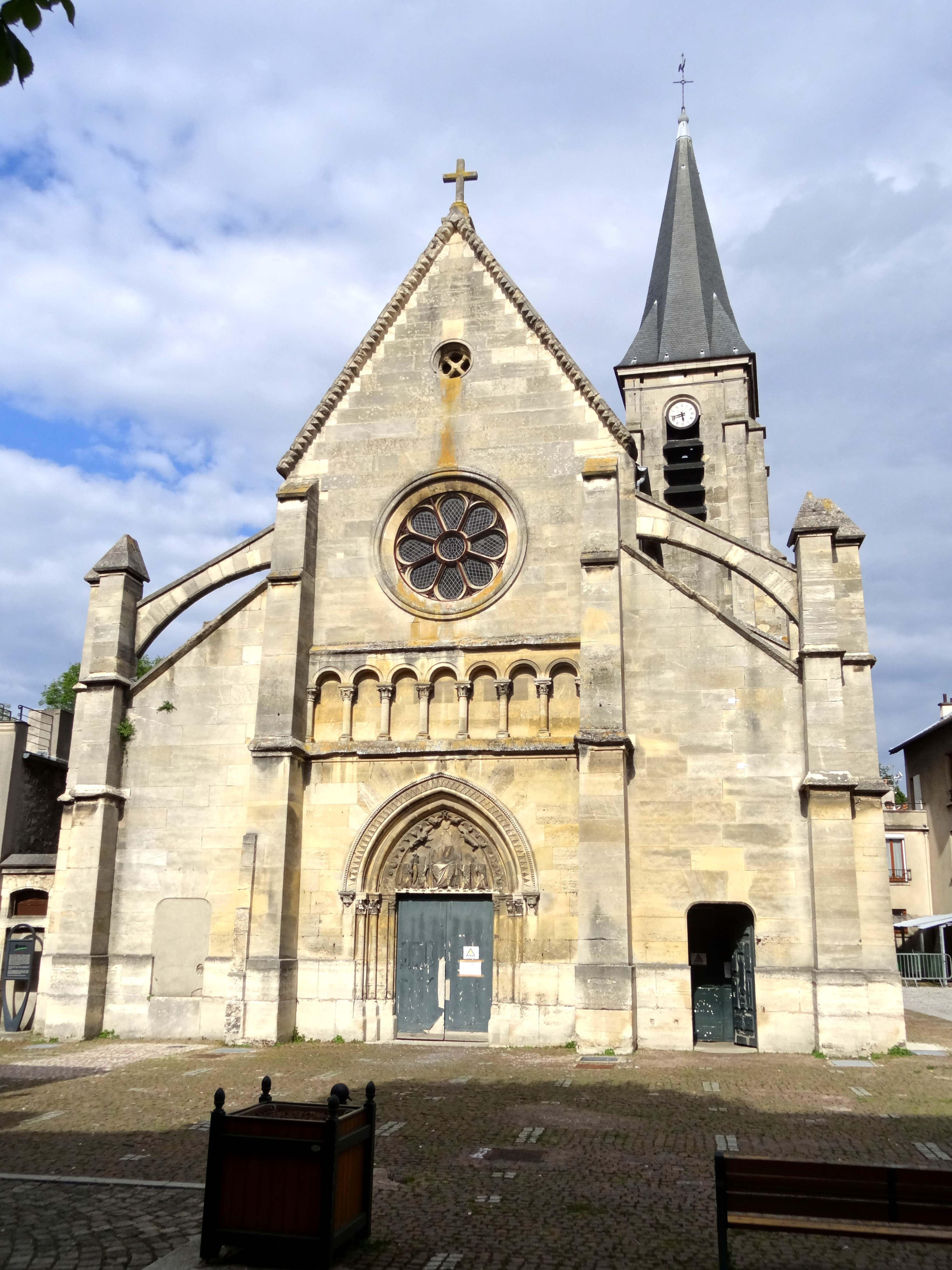 Église Saint-Hermeland de Bagneux - voir titre.